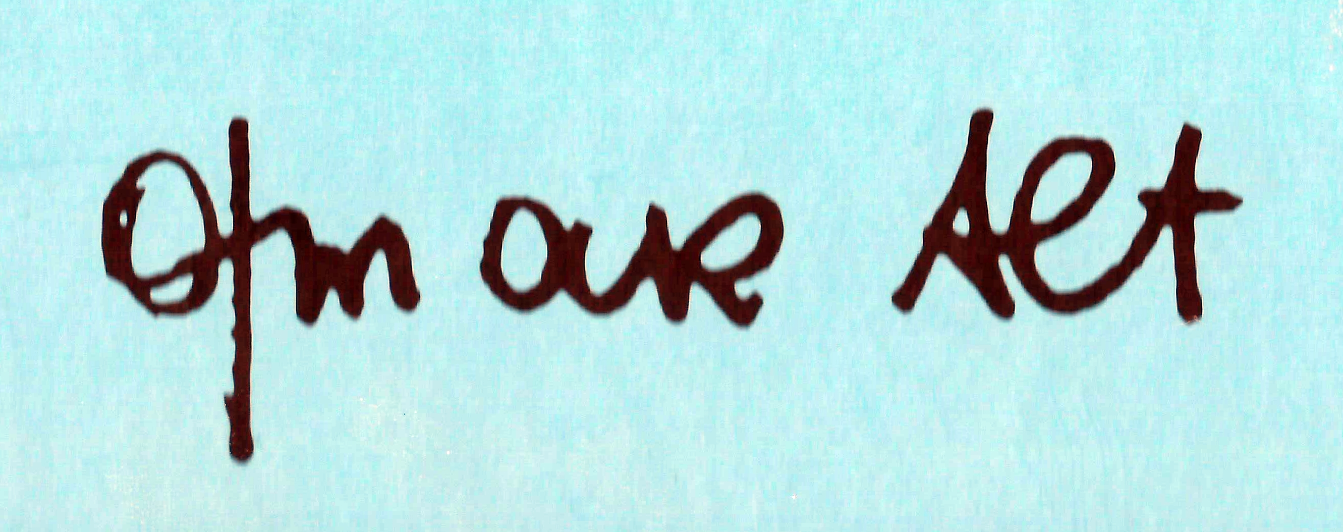 Signatur des Otmar Alt, gescannt von Otmar Alt Rückblick und Ausblick, keine Schöpfungshöhe